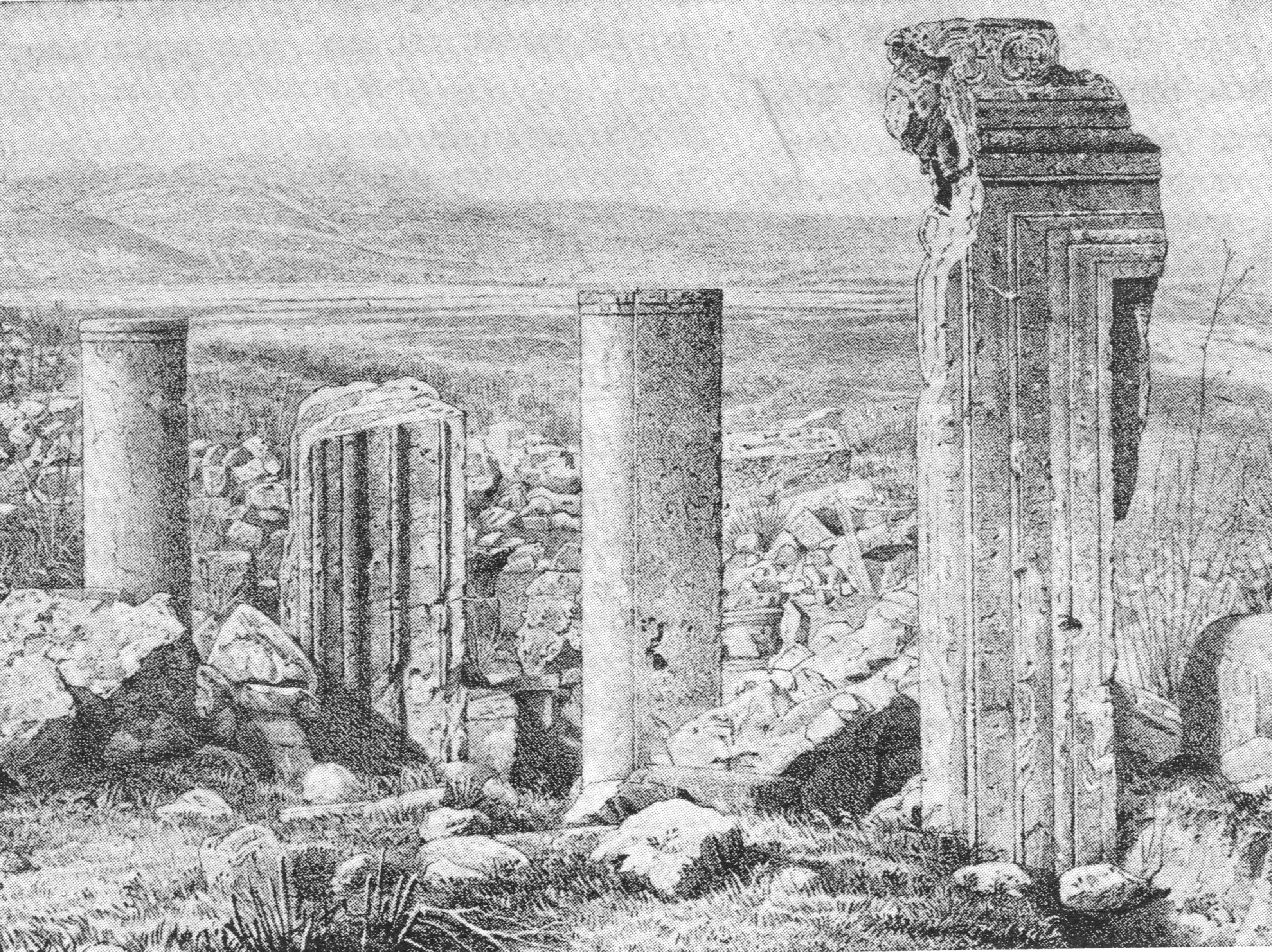 ציור של בית הכנסת העתיק בארבל כפי שצוייר על ידי קלוד קונדר במסגרת הסקר של הקרן לחקר ארץ ישראל